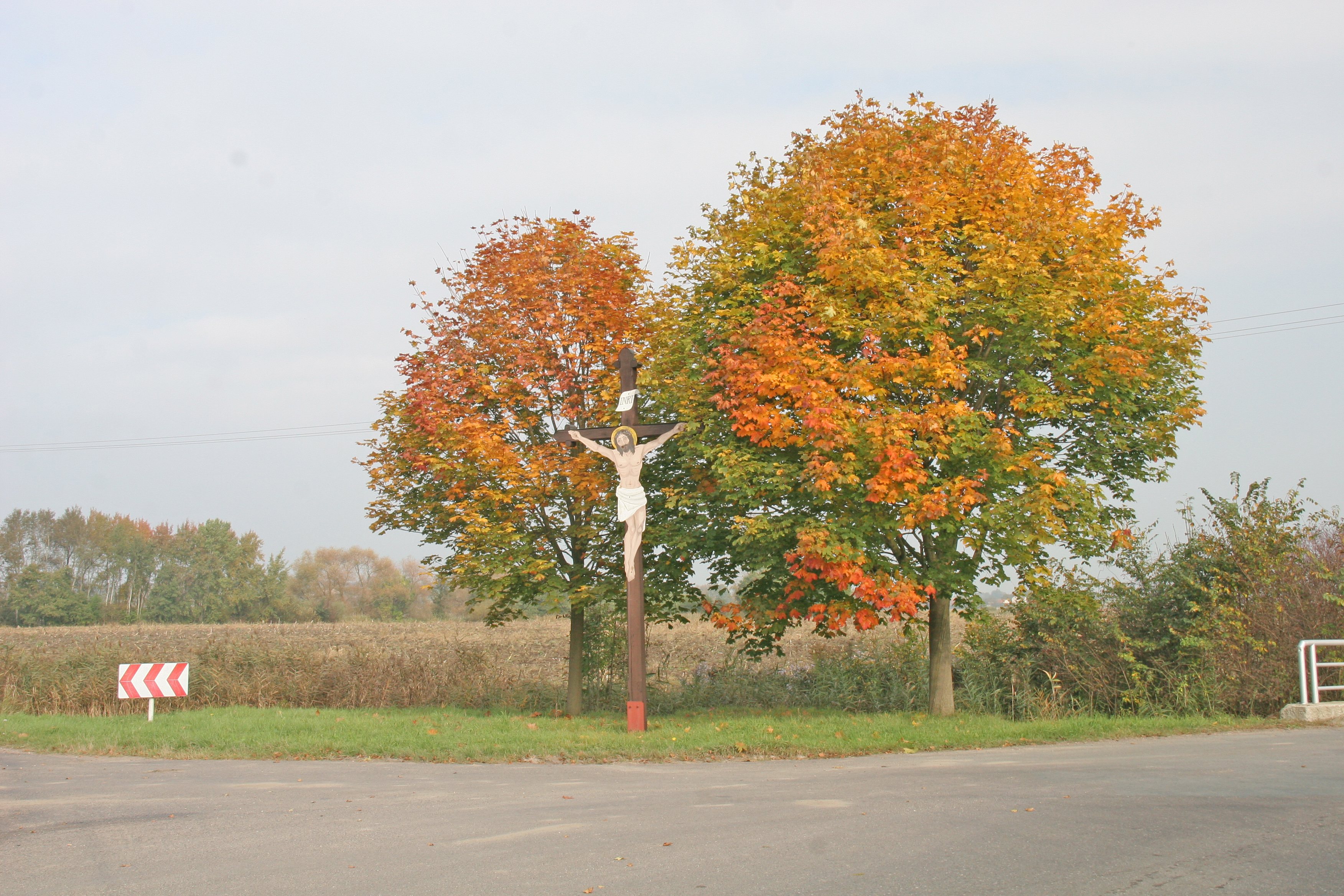 Strašov kříž